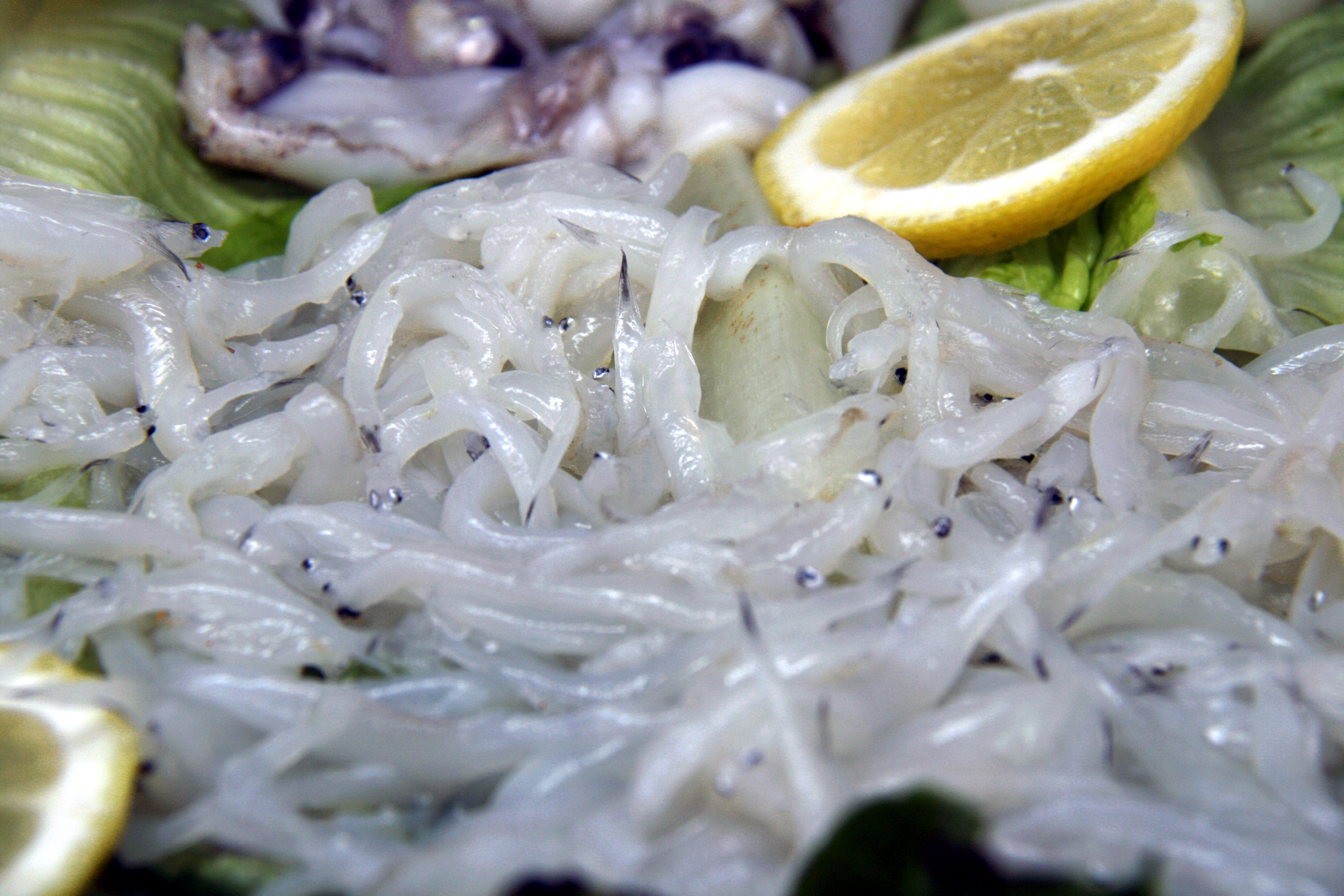 Angulas.